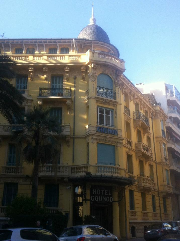 Immeuble au 3 rue Gounod à Nice, France.